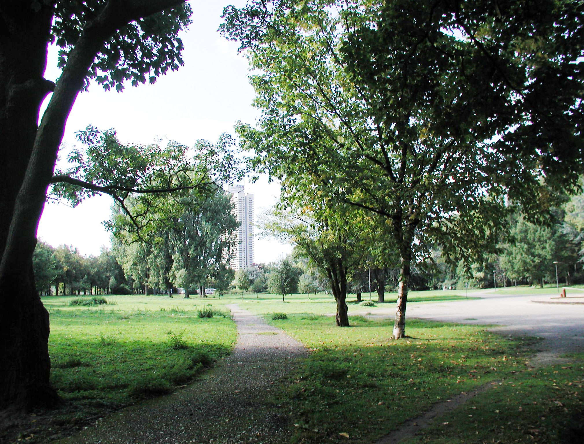 Köln, "Riehler Aue" Teilareal der BUGA 71